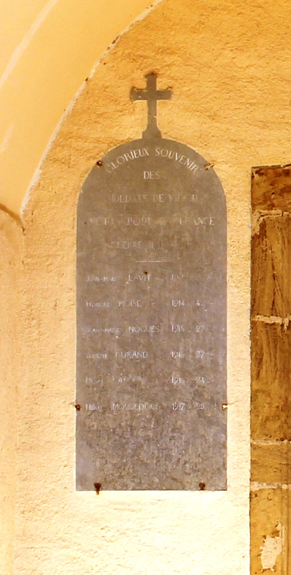 Monument aux morts de Vidou (Hautes-Pyrénées)